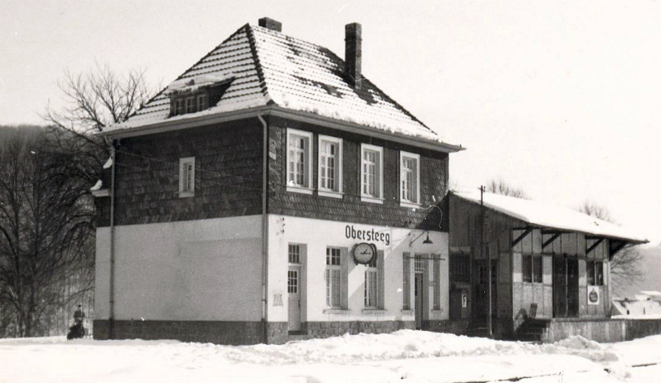 Ehemaliger Bahnhof Obersteeg, erste Produktionsstätte der Multibeton-Estrichzusatzmittel in den 1960er Jahren